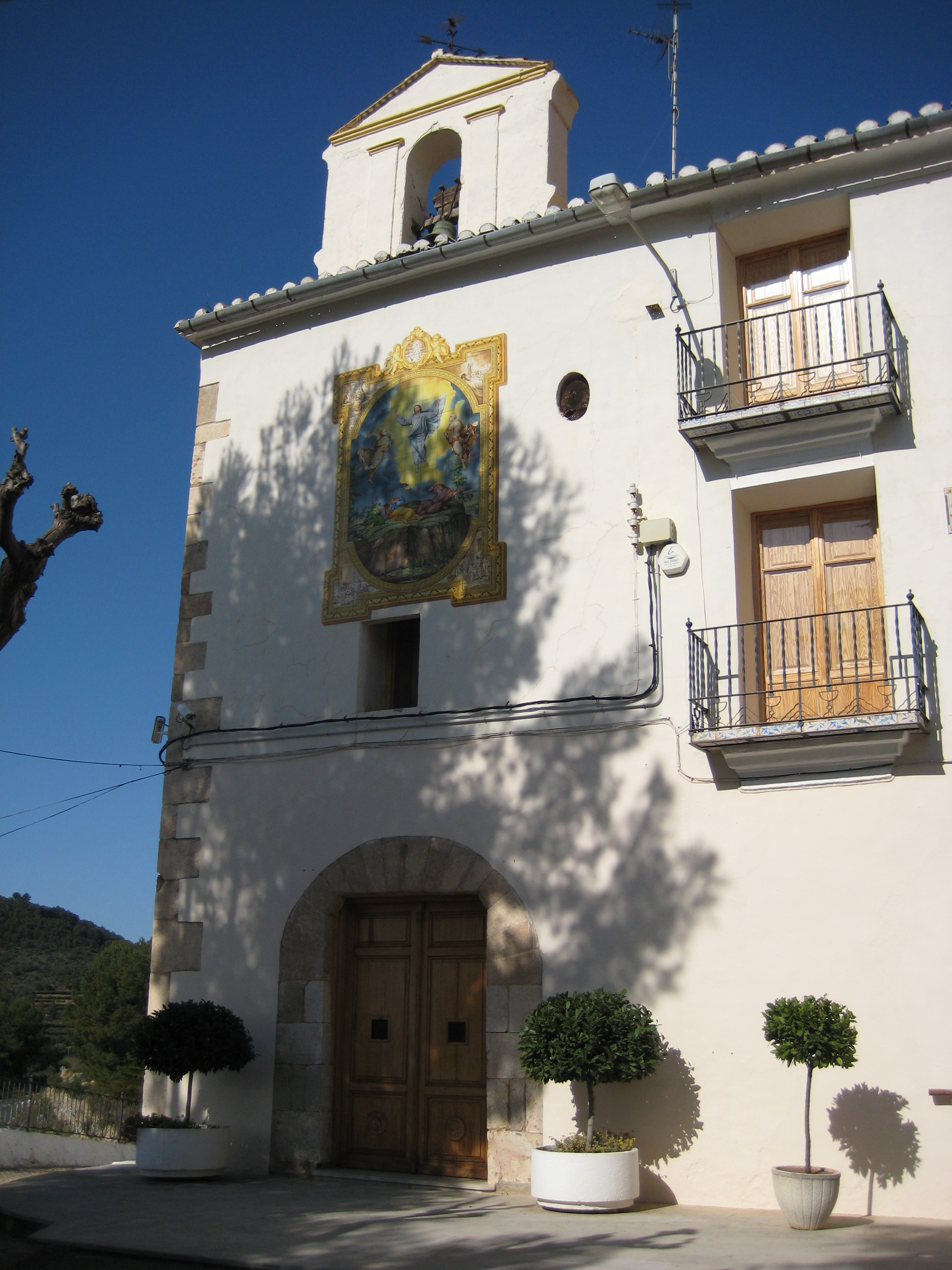 Façana de l'ermita del Salvador d'Onda (Plana Baixa)